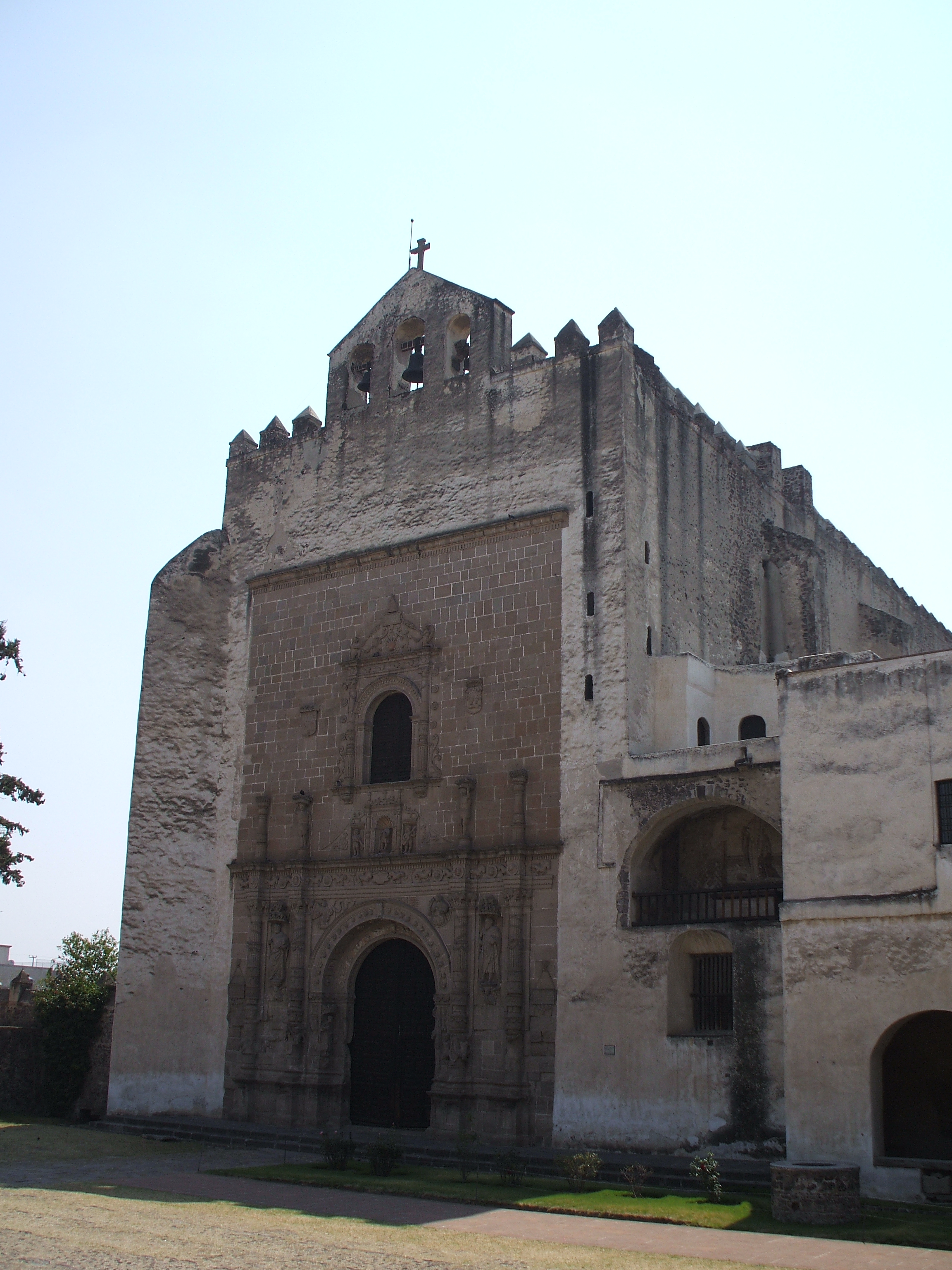 Fachada del convento de San Agustín Acolman